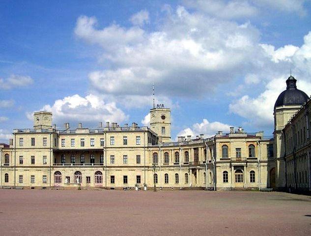 Гатчинский дворец. Плац перед дворцом